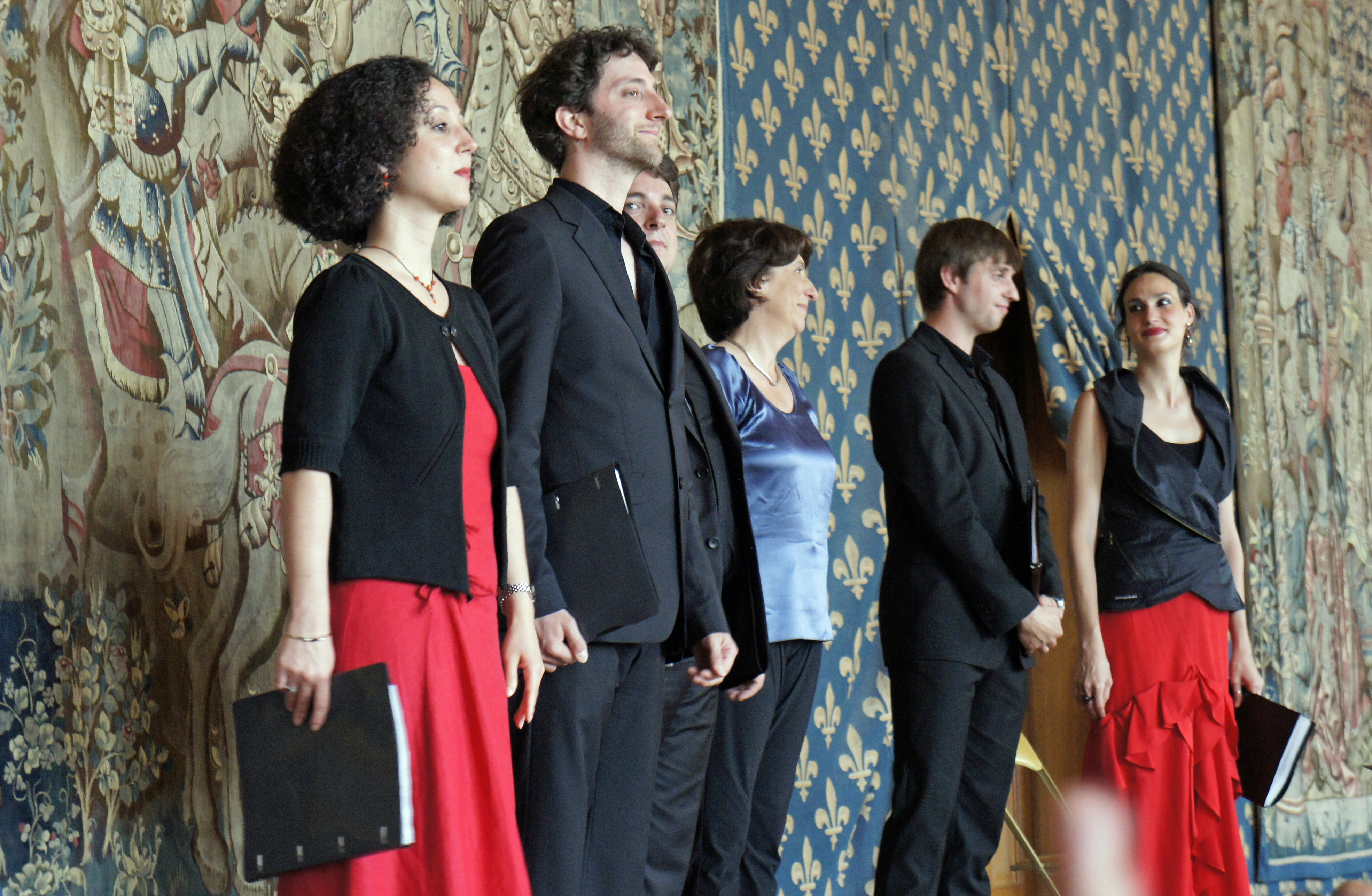 Concert de l'Akadêmia Françoise Lasserre dans la salle du baquet du palais du Taulors des Flâneries musicales 2012.